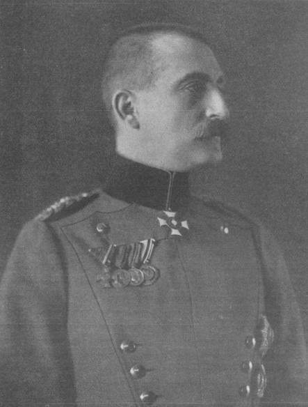 Ulrich Maria Ludwig Philipp Joseph Anton Herzog von Württemberg, 1910 - 1914 Kommandeur Ulanen-Regiment „König Wilhelm I.“ (2. Württembergisches) Nr. 20